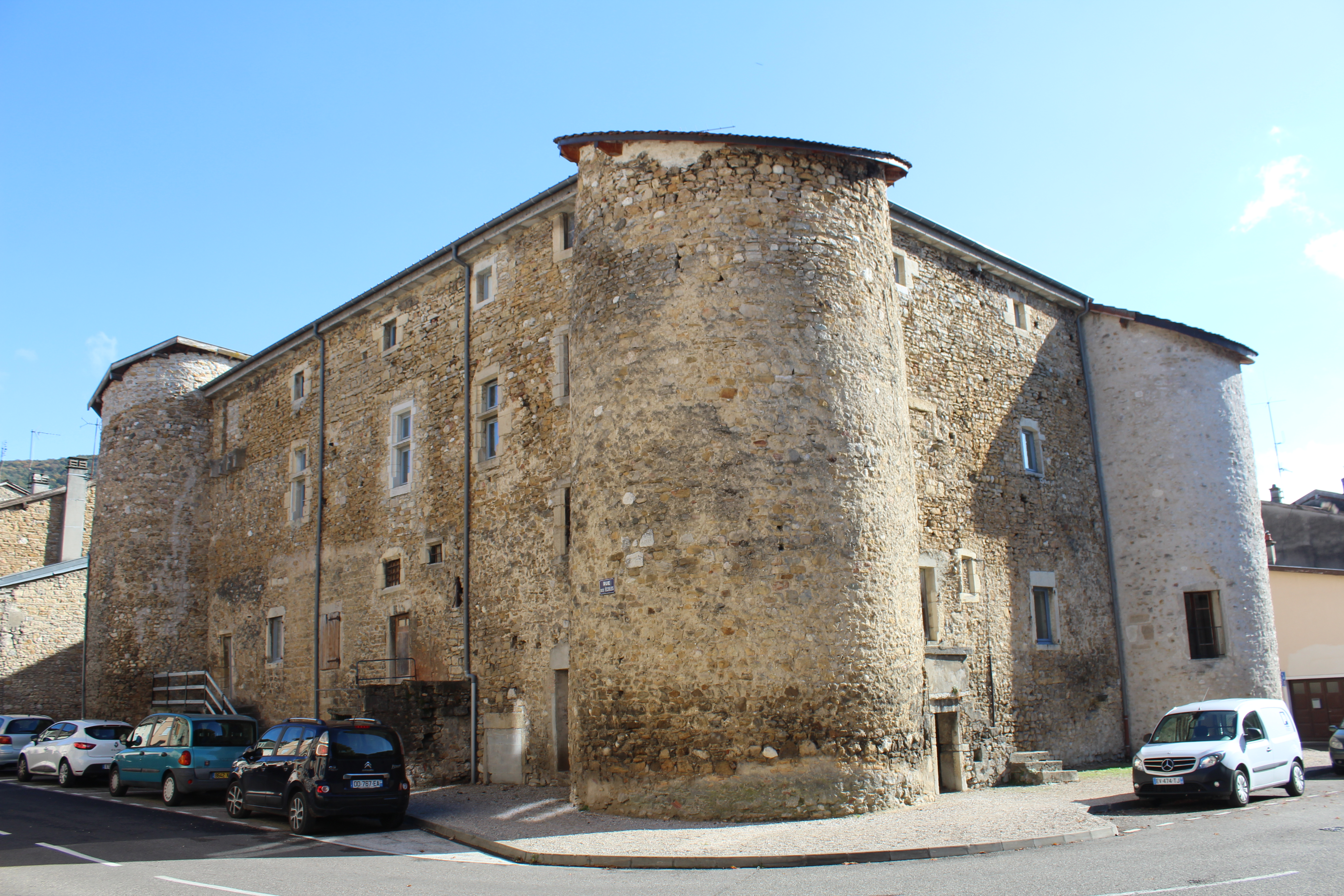 Château de Montferrand, Lagnieu.